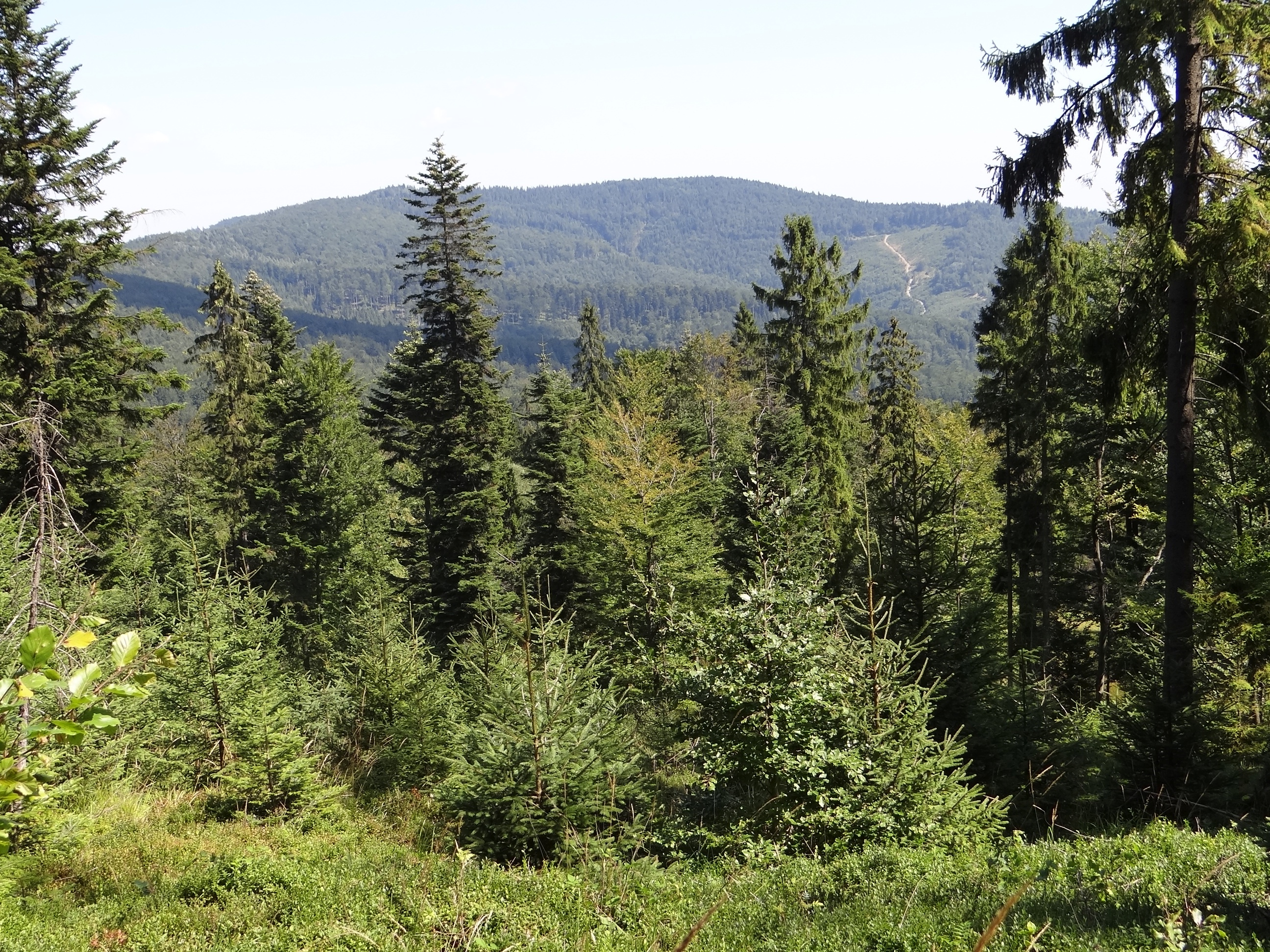 Polana Suwory. Widok na Leskowiec